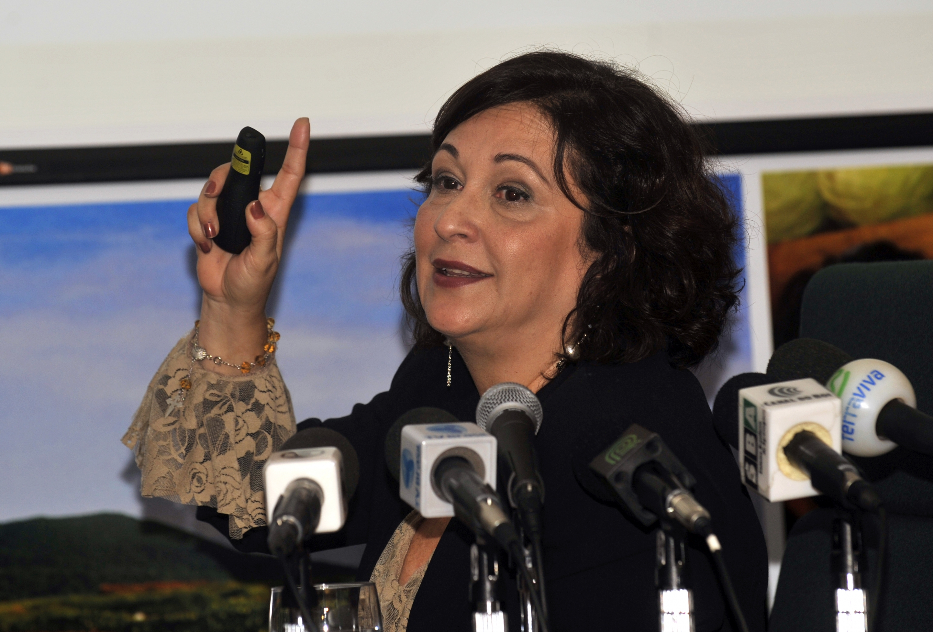 Brasília - A presidente da Confederação da Agricultura e Pecuária do Brasil (CNA), Kátia Abreu, disse, hoje (10), que o país corre o risco de diminuir em 48,8 milhões de hectares (ha) o tamanho das áreas de produção agrícola, entre 2011 e 2018, caso sejam mantidas as médias de demarcação de terras indígenas e de unidades de conservação ambiental dos governos Fernando Henrique Cardoso e Lula.